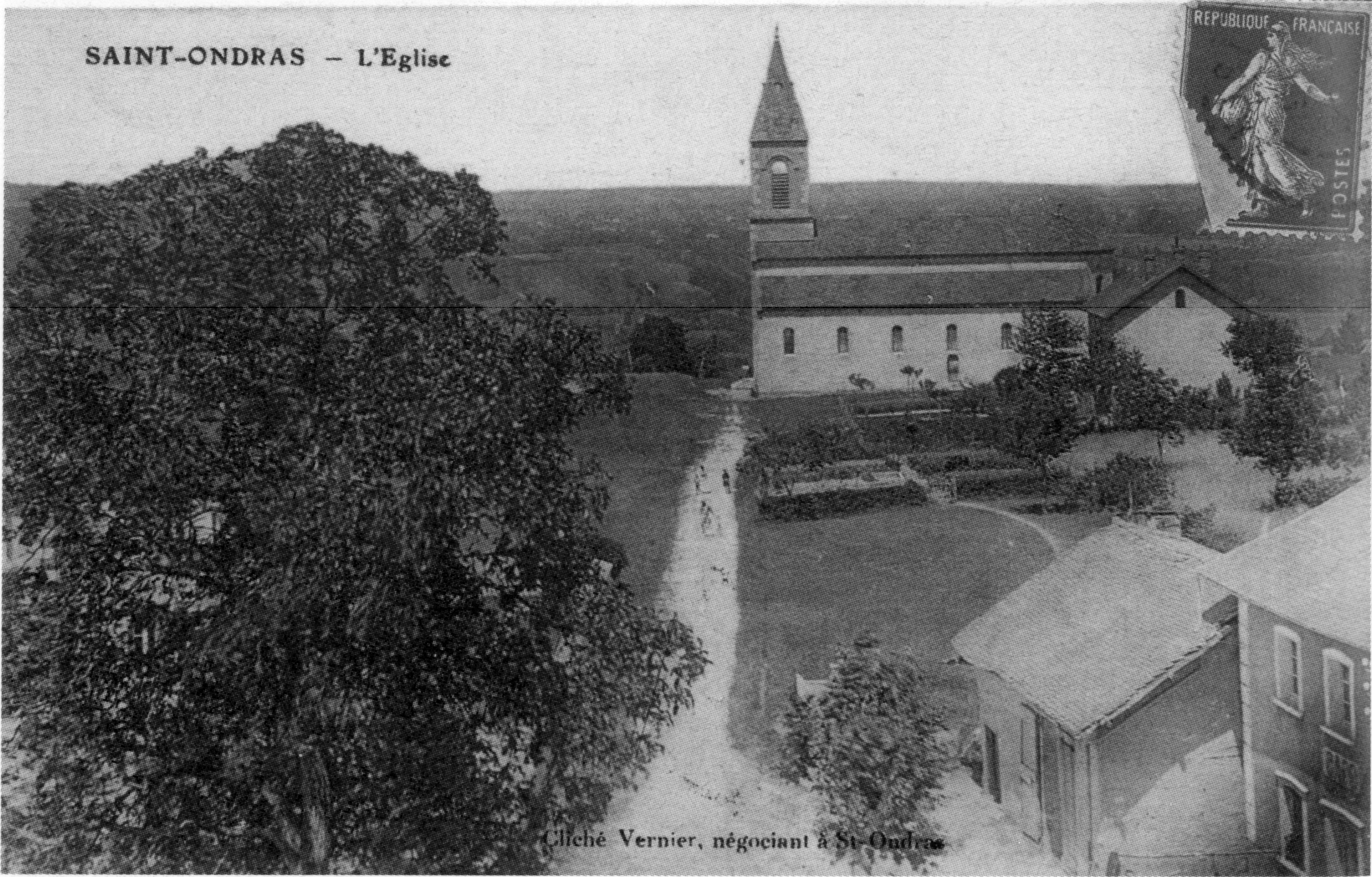 Saint-Ondras, l'église en 1912